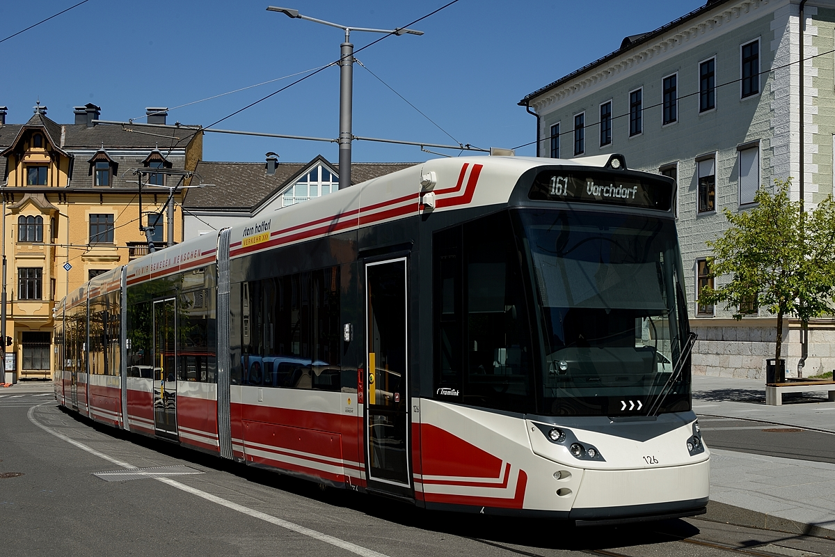 Tramlink 126 in Gmunden (Klosterplatz)